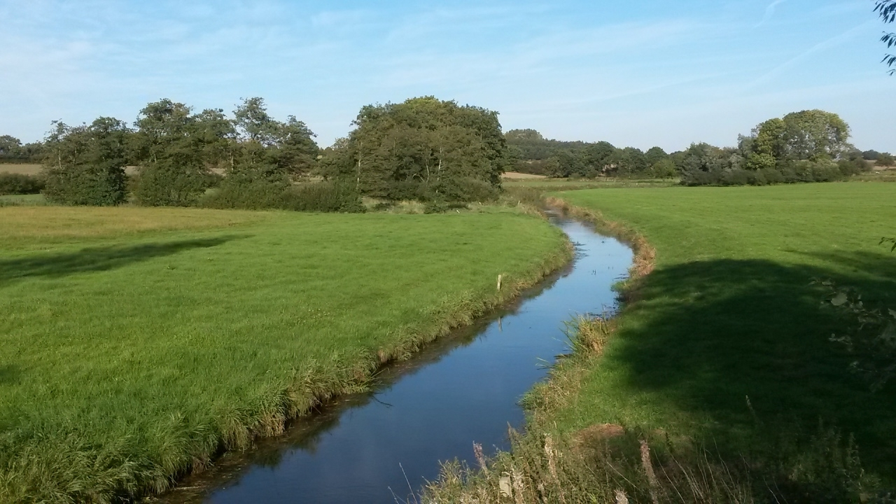 Die Ostenau bei Drelsdorf (fotografiert mit Blickrichtung Nordost (flussaufwärts) von der Straßenbrücke der Landesstraße 273)